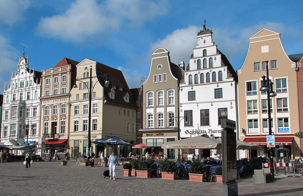 Giebelhäuser am Neuen Markt in Rostock / Deutschland